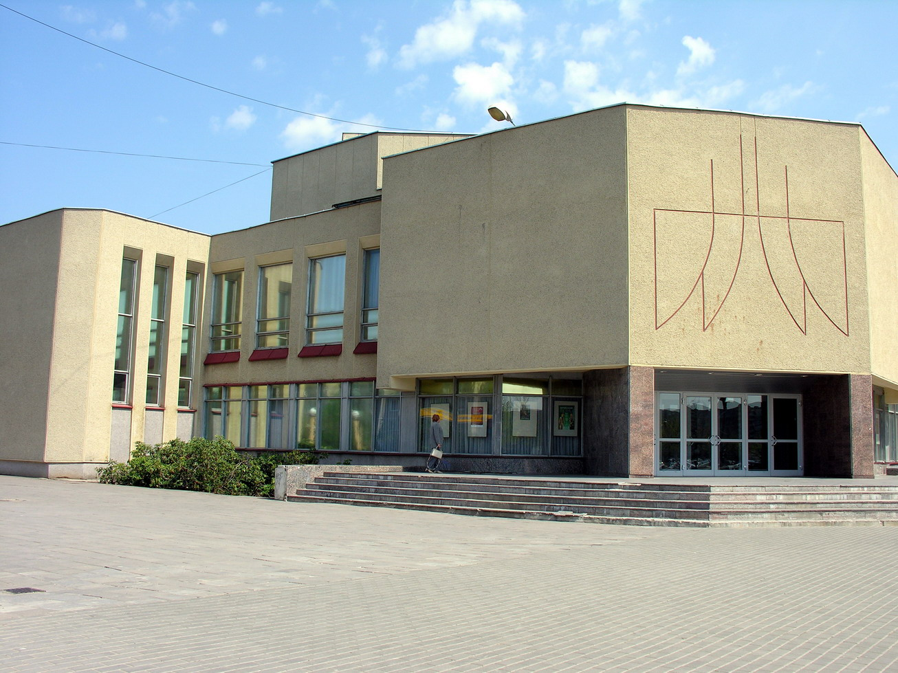 Mažeikių rajono savivaldybės kultūros centras Foto: Algirdas, 2006 m. gegužės 12 d.